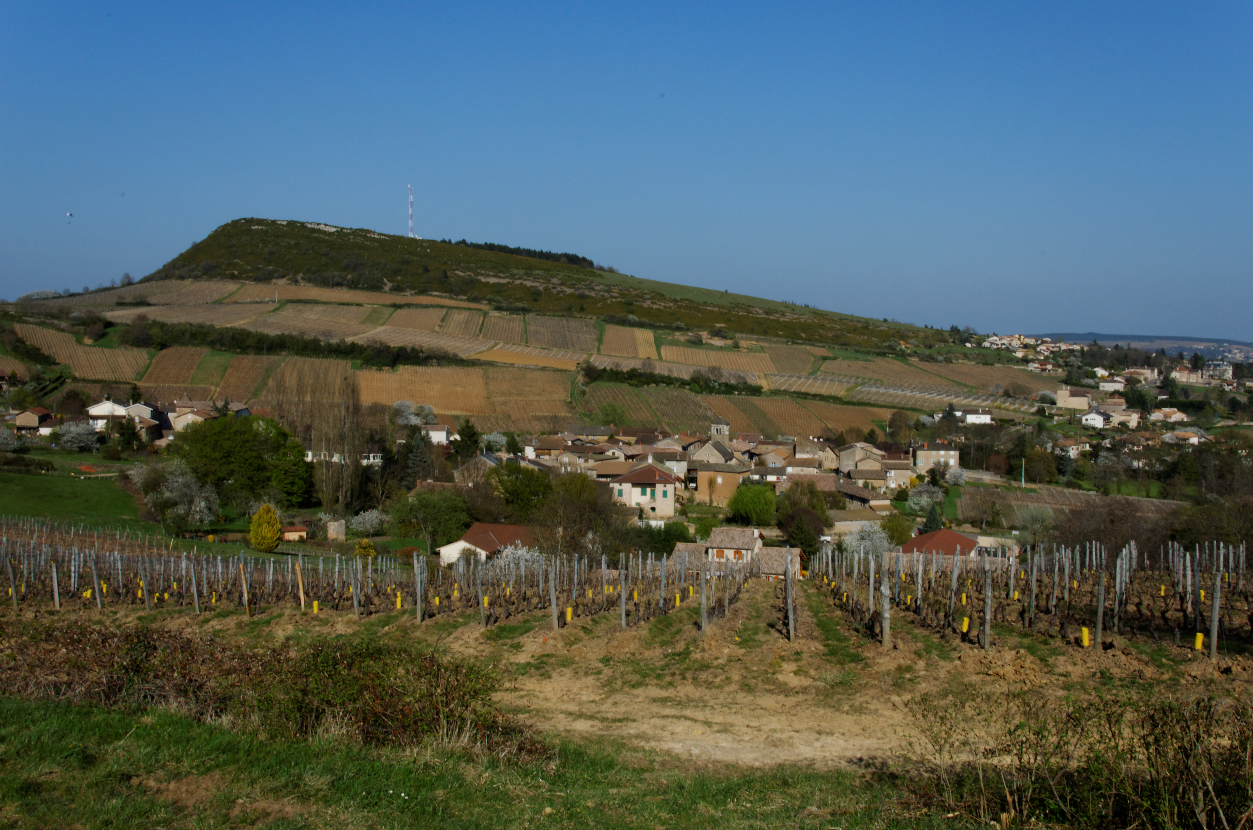 Vue de la commune de Bussières, Saône et Loire (71), France